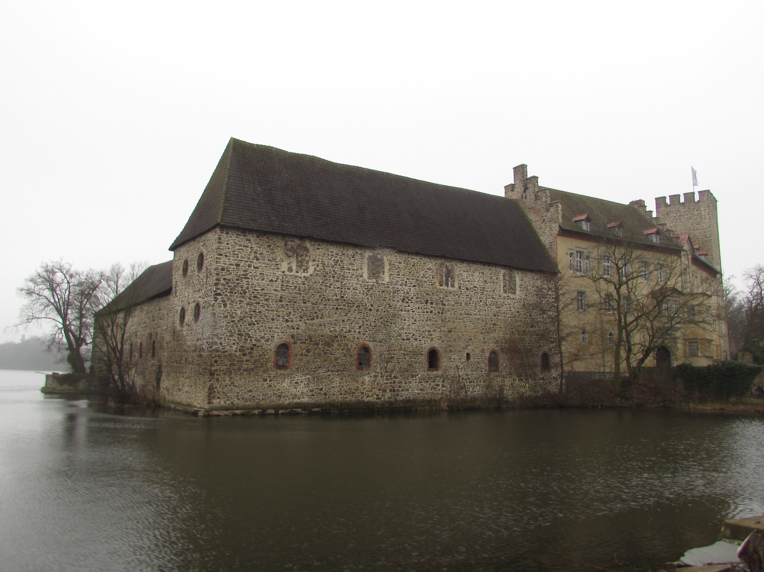 wasserburg/wasserschloss flechtingen